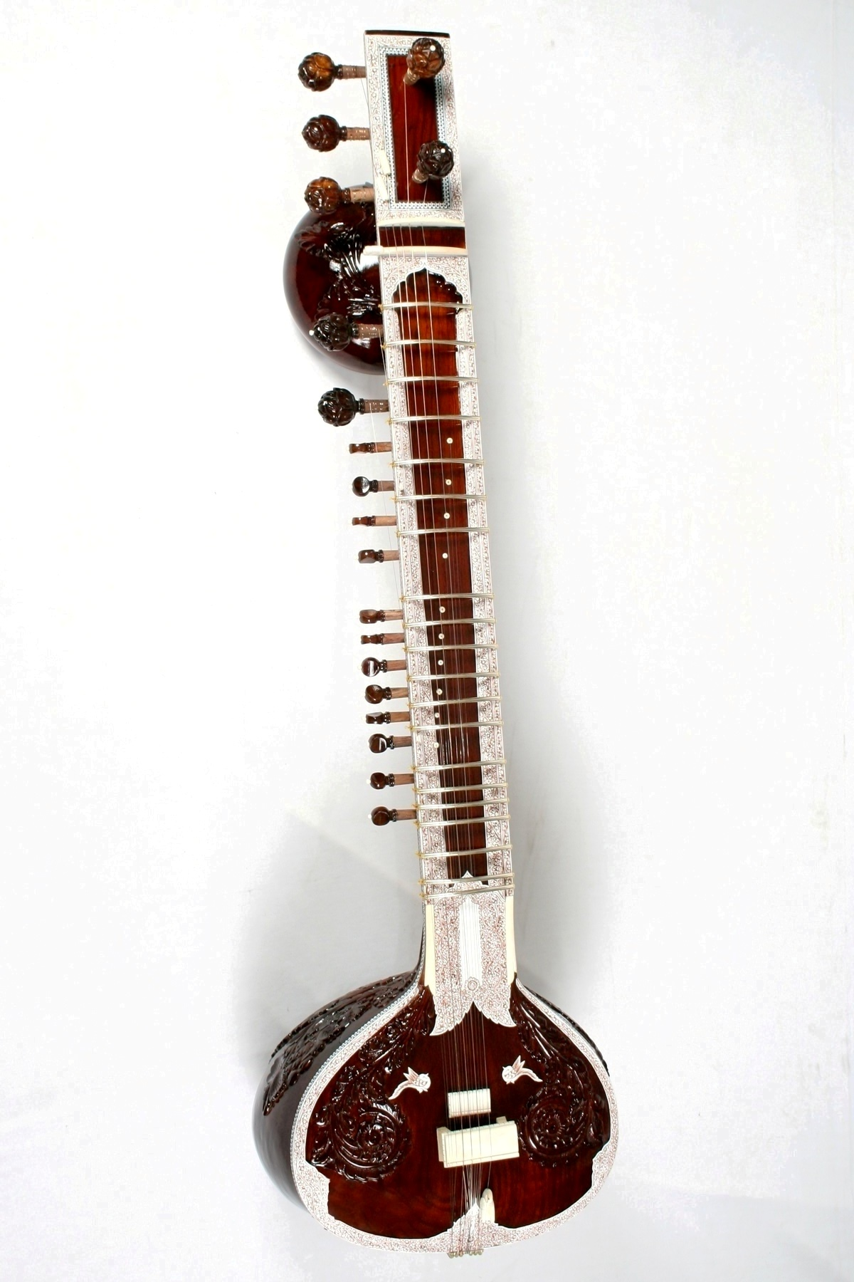 SITAR RAVI SHANKAR STYLE AT